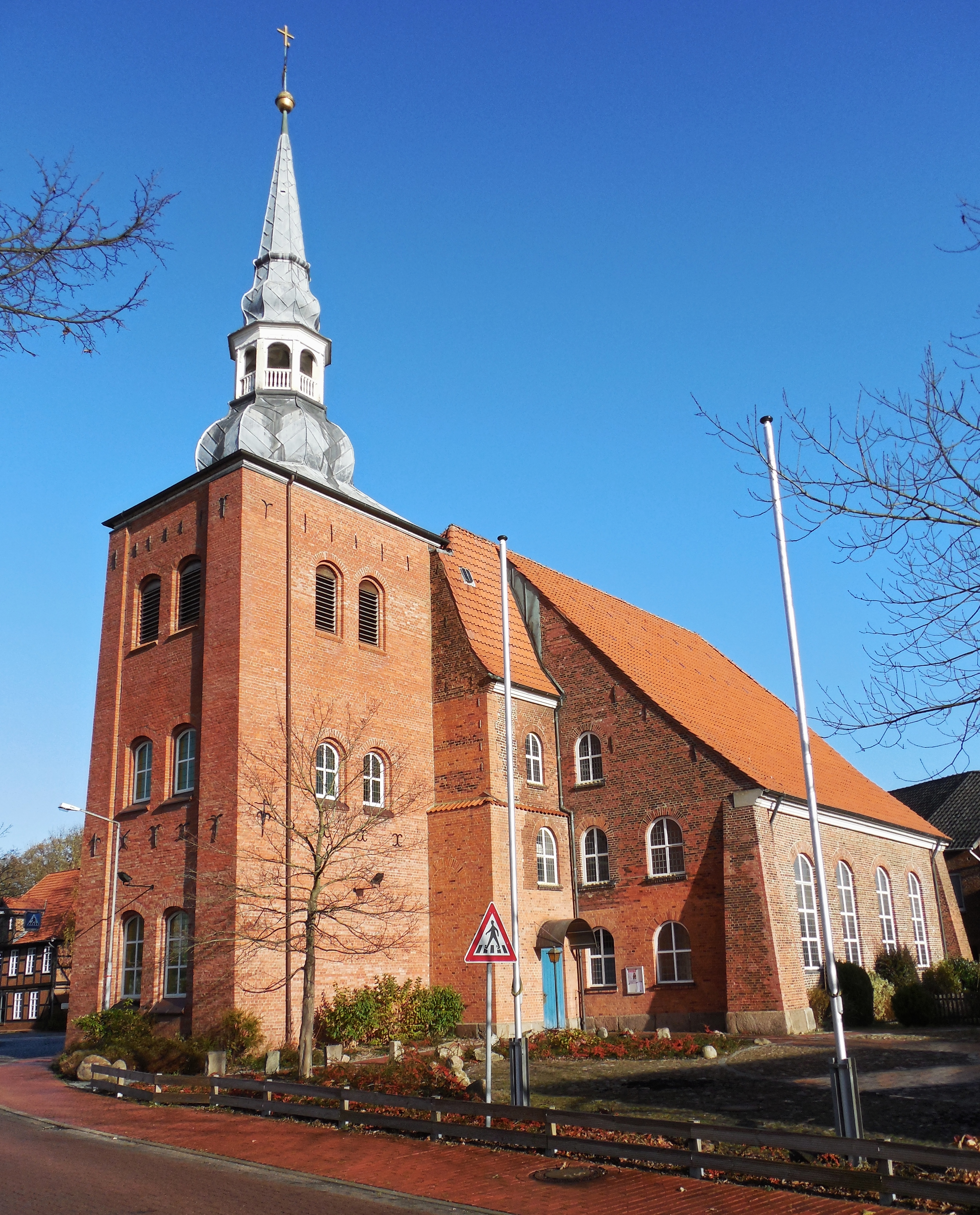 Liebfrauenkirche